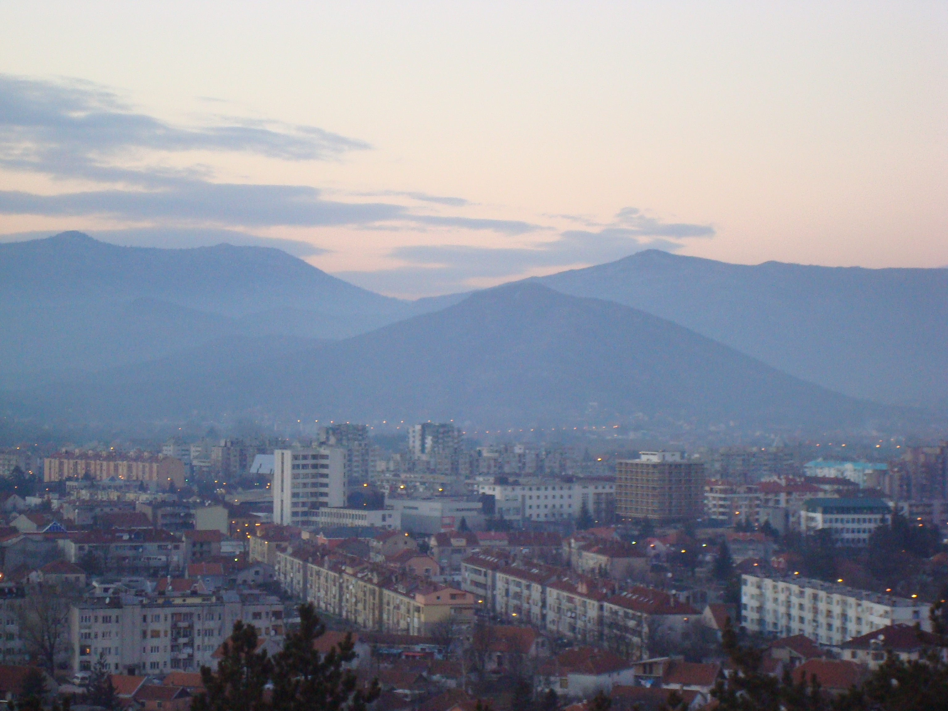 Nikšić - Pogled sa Trebjese